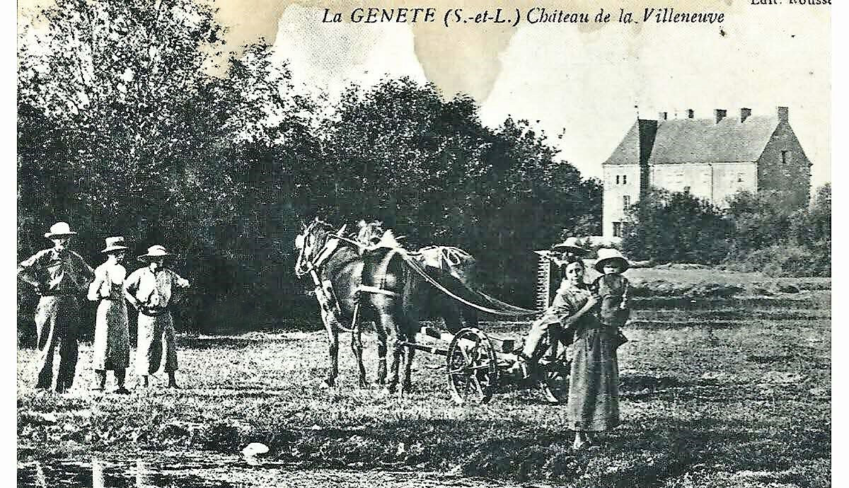 Château de la Villeneuve de La Genête Saône-et-Loire